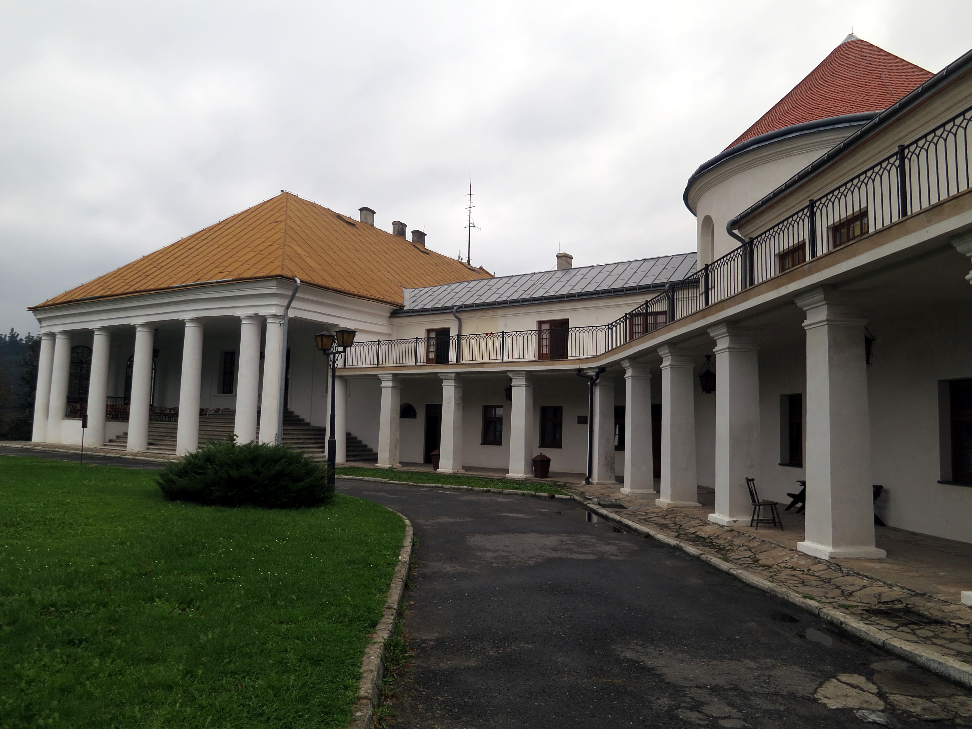 Lesko, zamek, pocz. XVI, 1580, 1656, 1765-1771, 1837-1843, 1922-1924